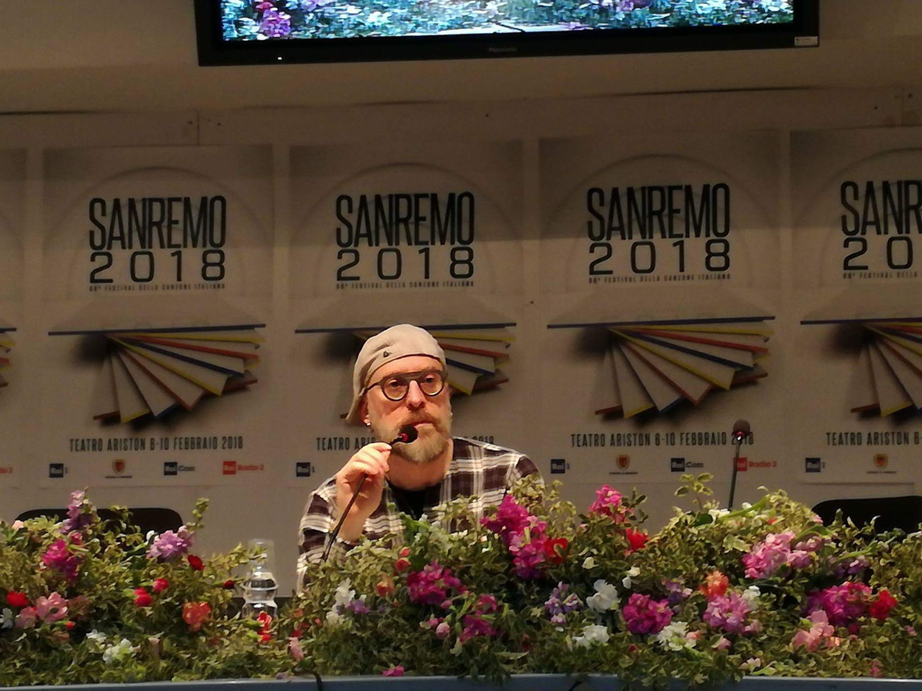 Mario Biondi a Sanremo 2018